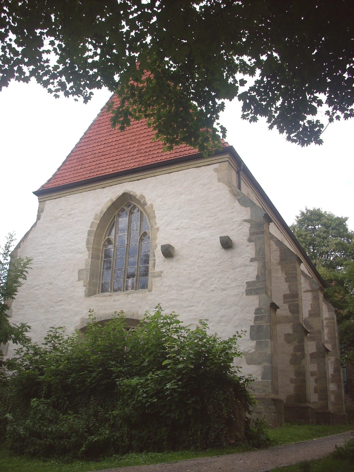 Ehem. Franziskanerkloster Hildesheim, Portiunkula-Kapelle (vollendet 1490)